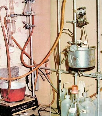 Foto eines illegalen Methamphetaminlabors